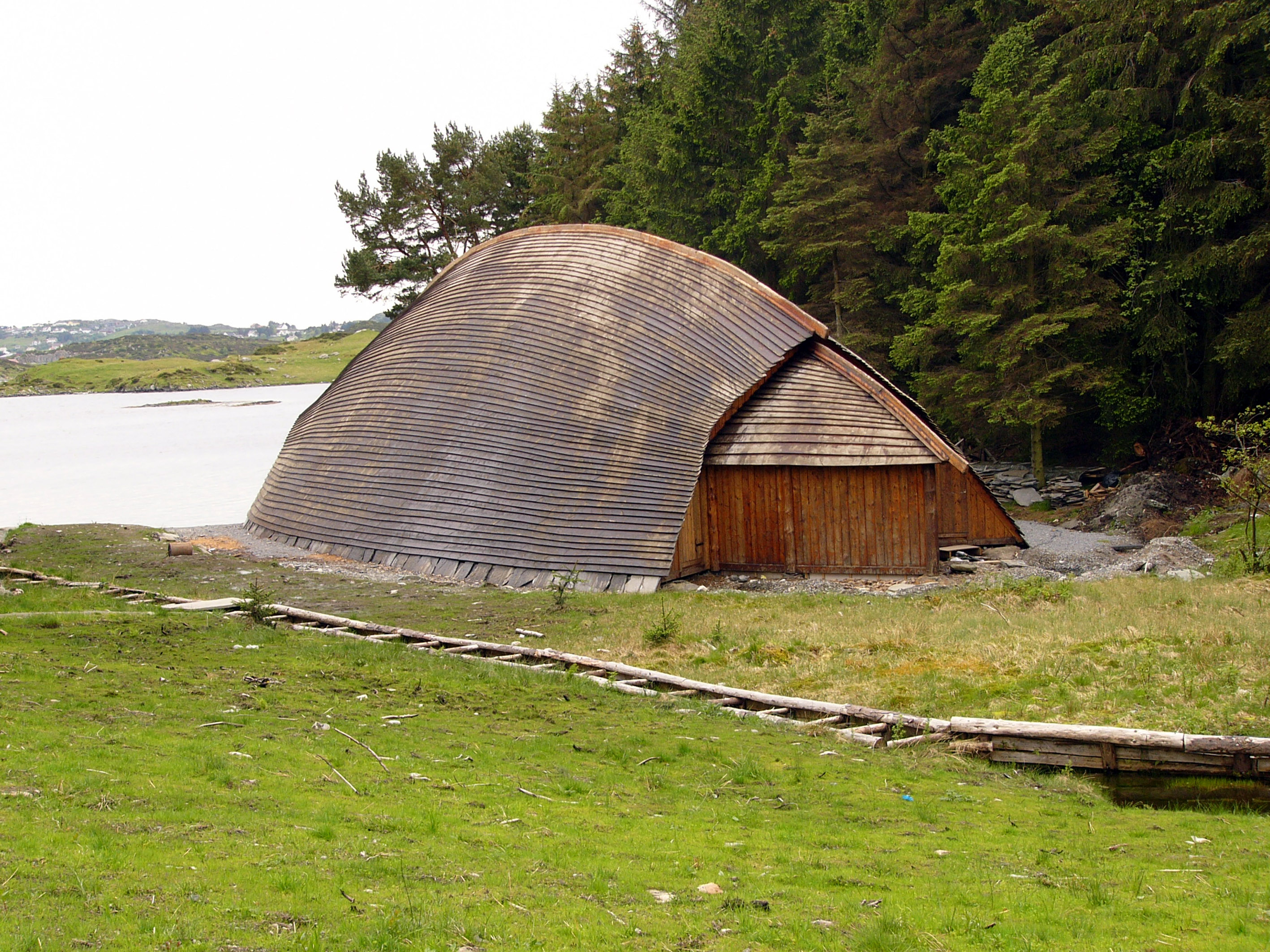 Rekonstruiertes Bootshaus aus der Wikingerzeit im Freilandmuseum Karmøy